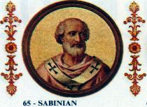 Pope Sabinian